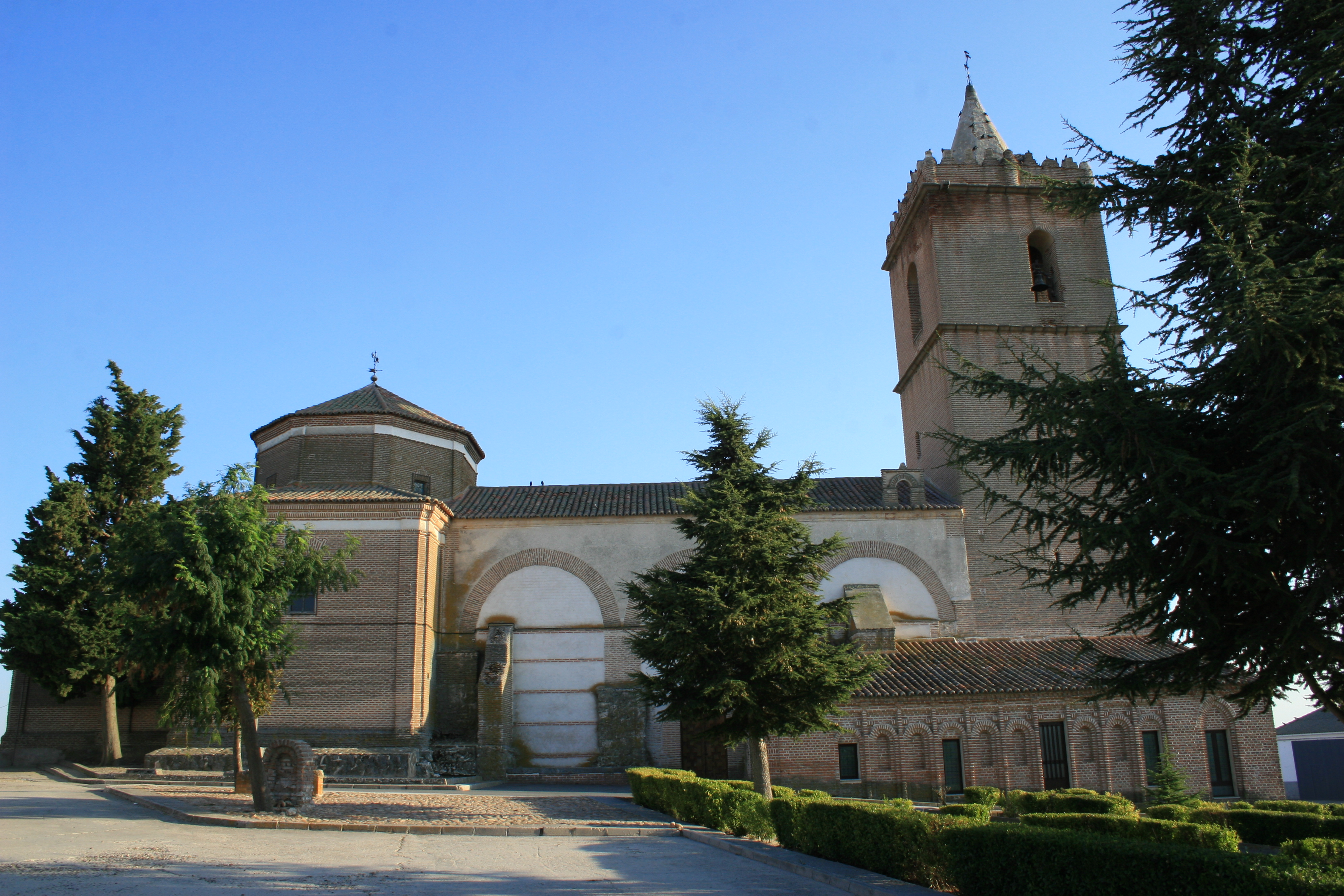 Cisla